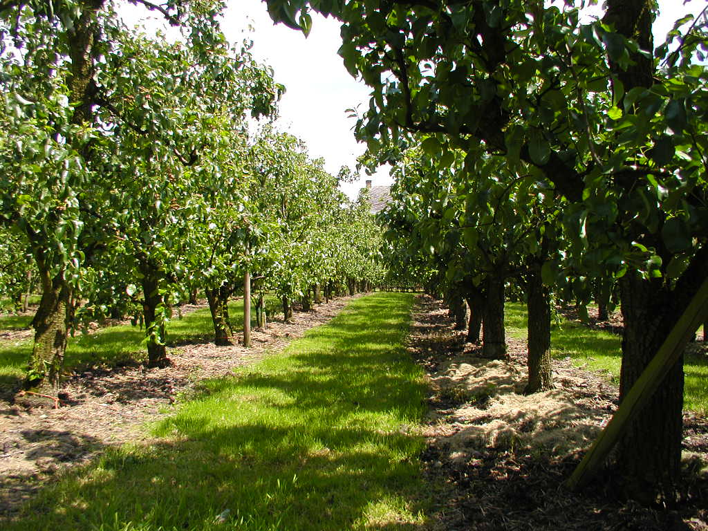 Photo de notre verger situé à la Rue du Tilleul à Bombaye en Belgique